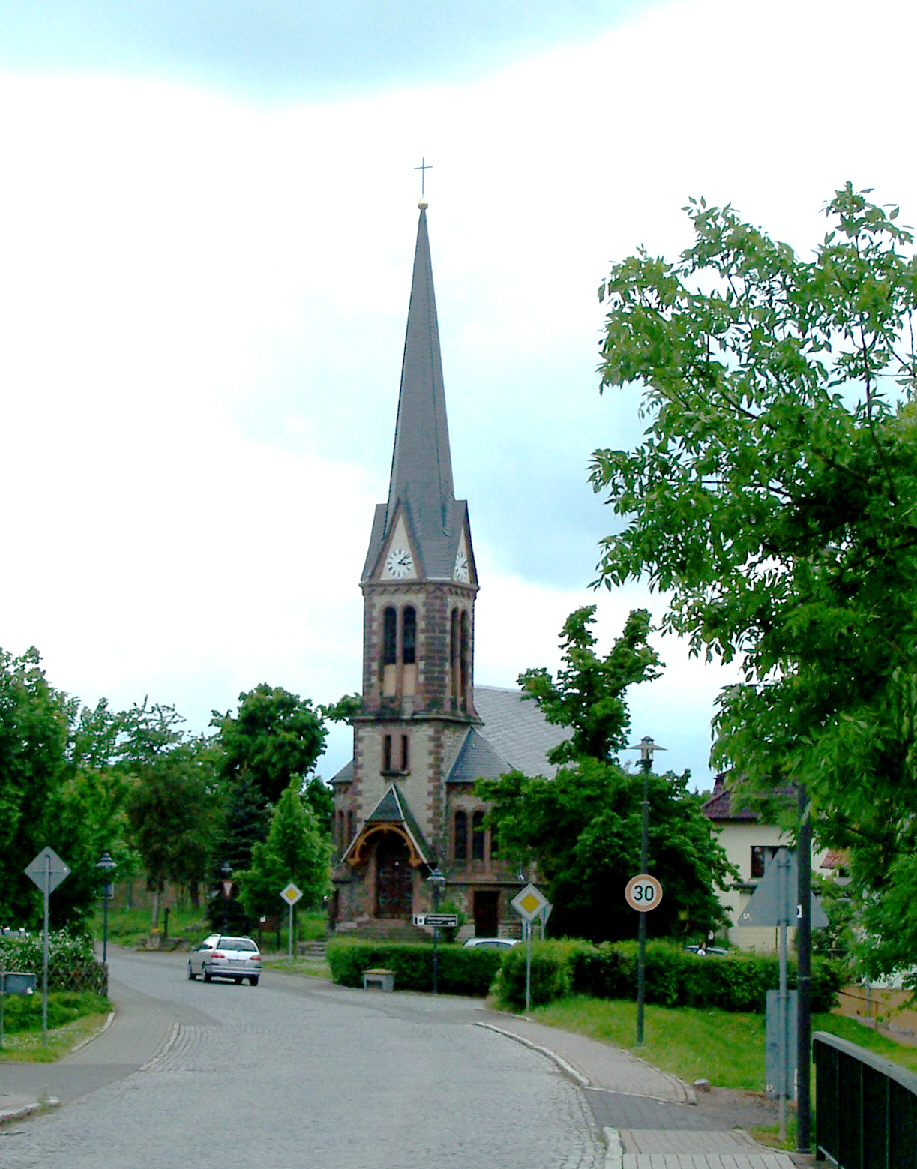 Hörschel